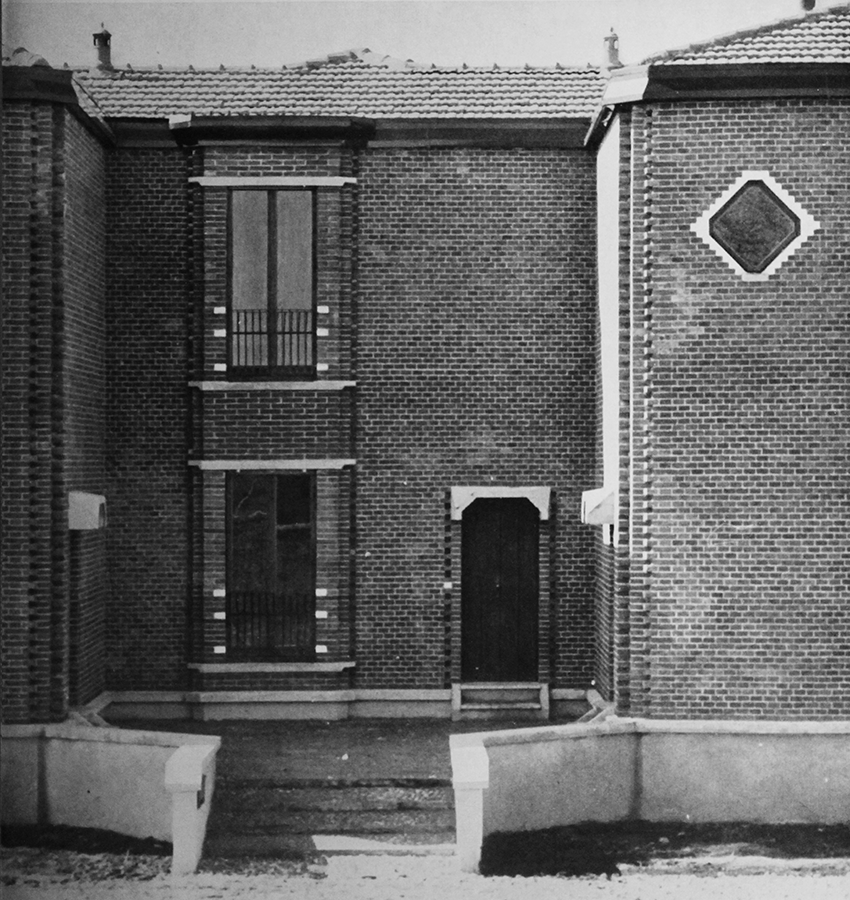 Tre unità residenziali duplex per dipendenti, Cameri, 1955-56. Fotografia dall'archivio privato di Lodovico Meneghetti